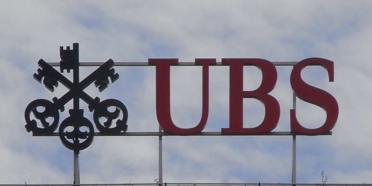 Das UBS-Zeichen mit den SBV-Schlüsseln in Zürich.